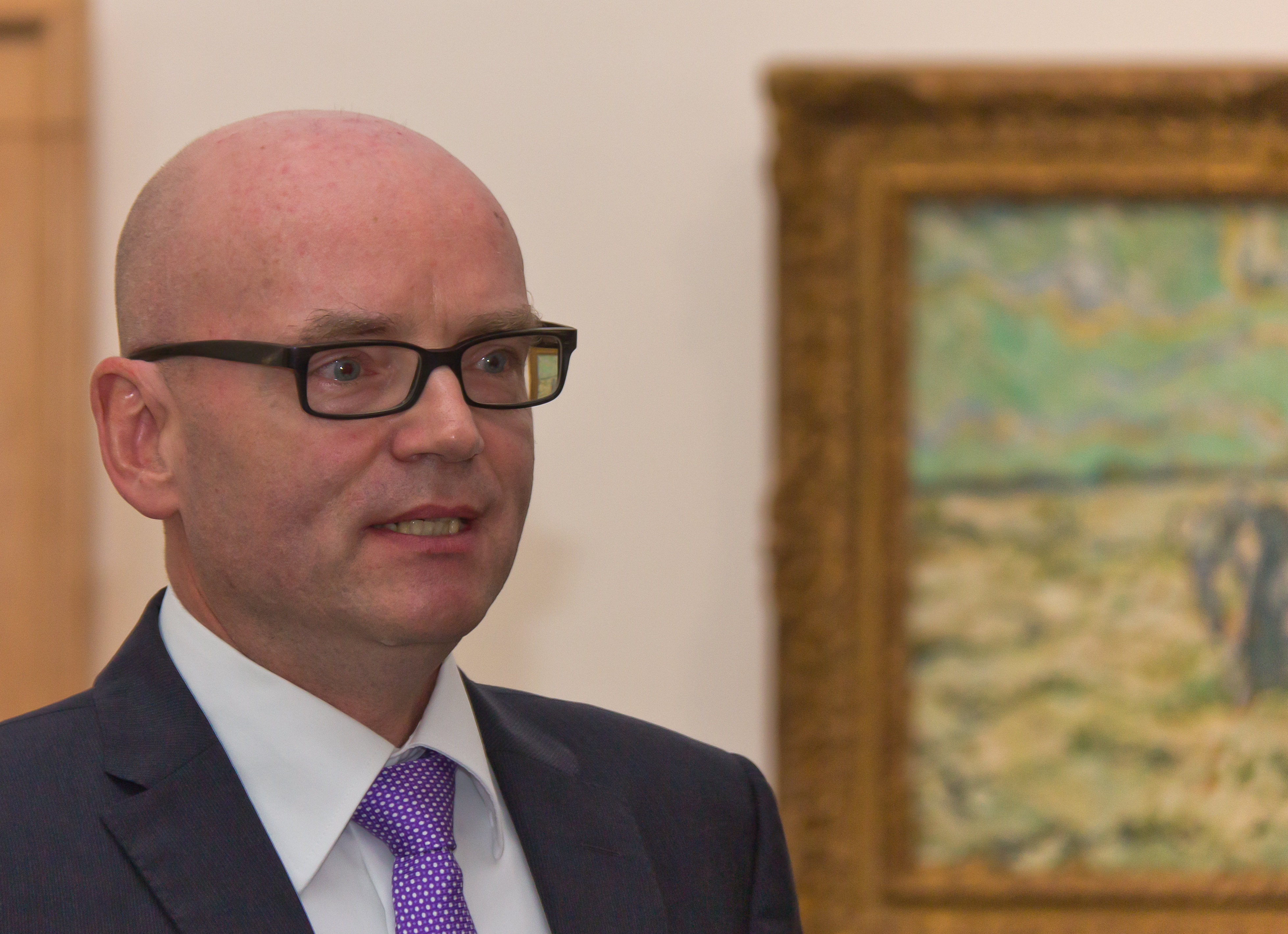 Unter dem Titel „1912 – Mission Moderne. Die Jahrhundertschau des Sonderbundes“ zeigt das Kölner Wallraf-Richartz-Museum vom 31. August bis zum 30. Dezember 2012 eine Rekonstruktion der Sonderbundausstellung aus dem Jahr 1912Pressekonferenz zur Ausstellungseröffnung. Andreas Blühm, Direktor des Museums